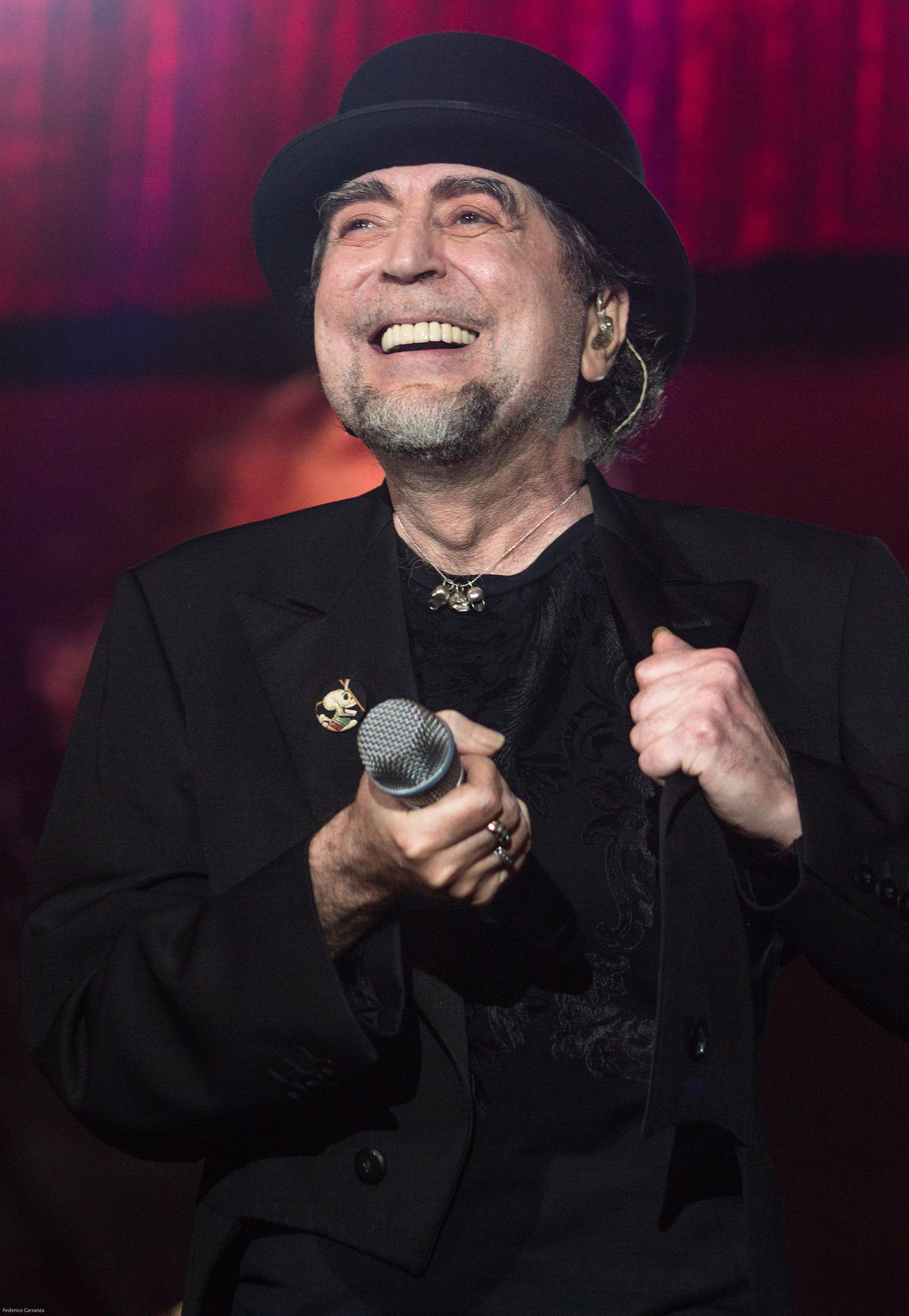 Joaquín Sabina durante la gira 500 noches para una crisis en el Teatro Metropolitano de Medellín, junio de 2015.